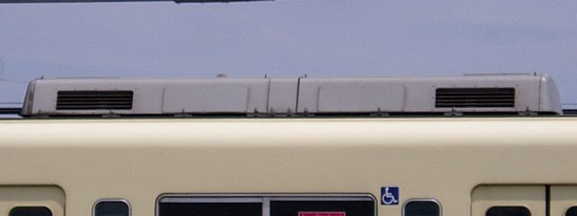 小田急8000形の冷房装置 CU195A 2007.06.02 栢山駅～富水駅にて 投稿者が撮影